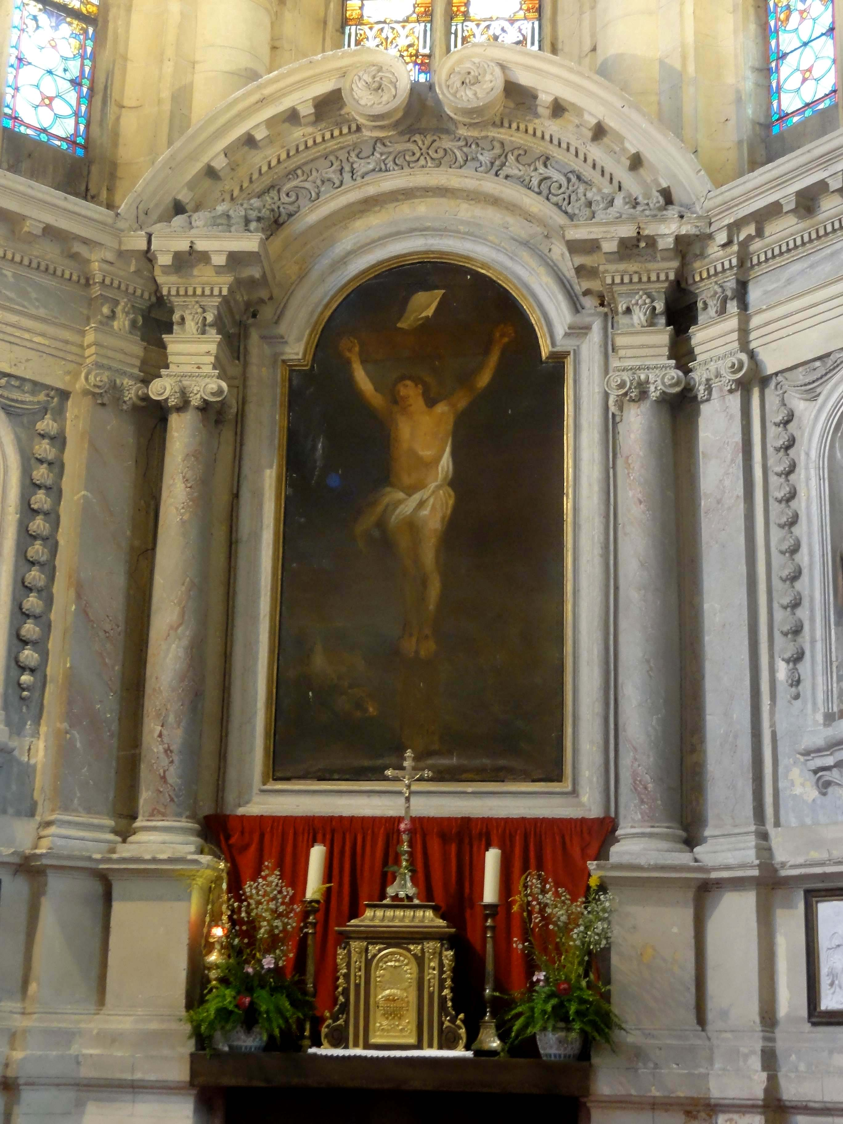 Mobilier de l'église : voir titre.